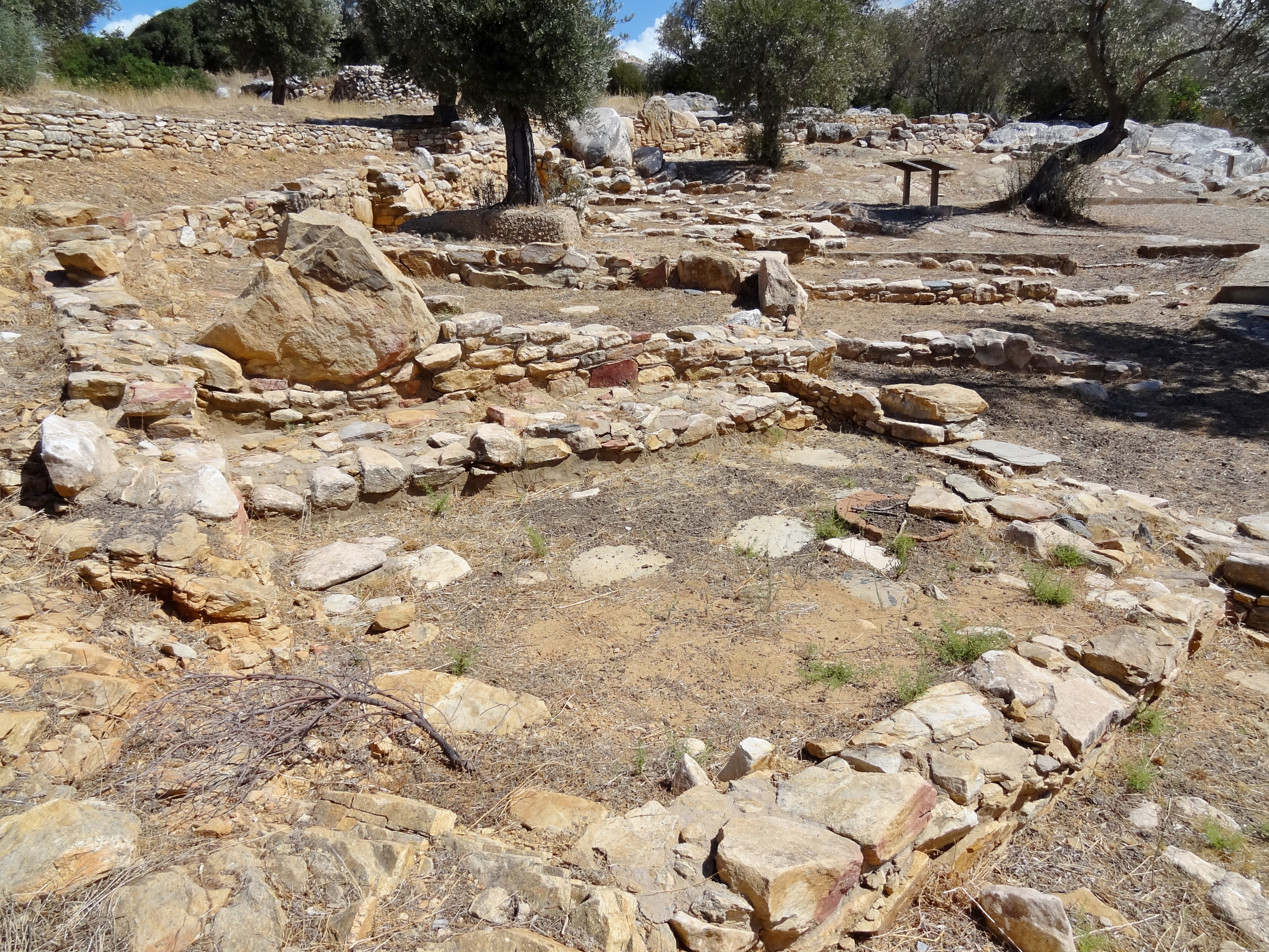 Heiligtum von Flerio auf Naxos, Kykladen, Griechenland